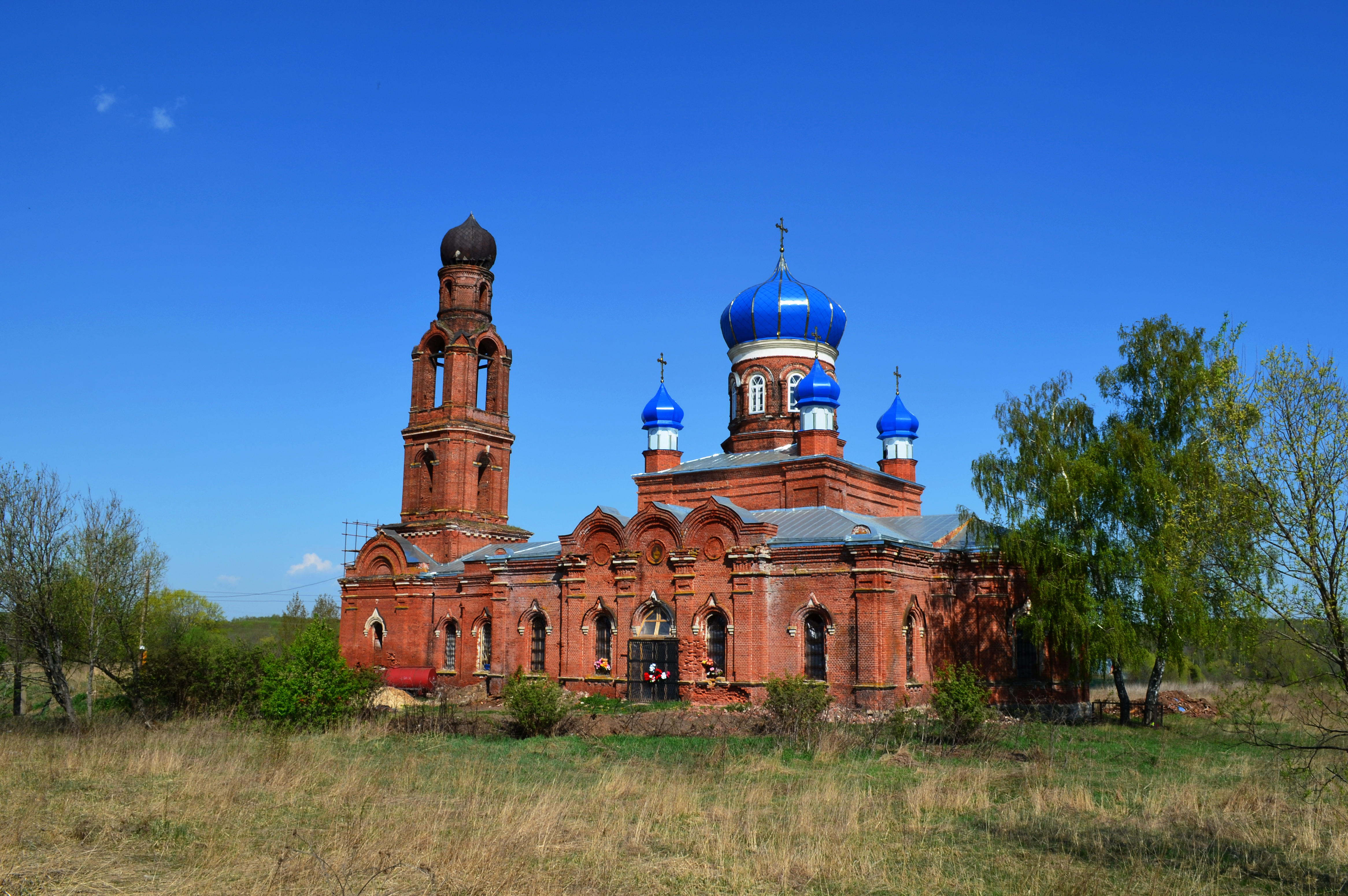 Благовещенский храм в Клин-Бельдине Зарайского района Московской области.